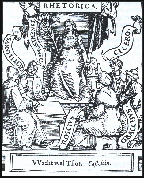 Gravure voorstellende de Rhetorica omgeven door Quintilinus, Demosthenes, Cicero, Roscius en Gracchus, te identificeren aan de hand van hun namen op de banderollen. De cartouche onder de afbeelding bevat de kenspreuk van de auteur, "VVacht wel Tslot", en diens naam "Castelein". Uit de uitgave van 1555 (de oudst bekende) van de "Const van Rhetoriken", geschreven in 1548 door de Oudenaardse rederijker Matthijs de Castelein.